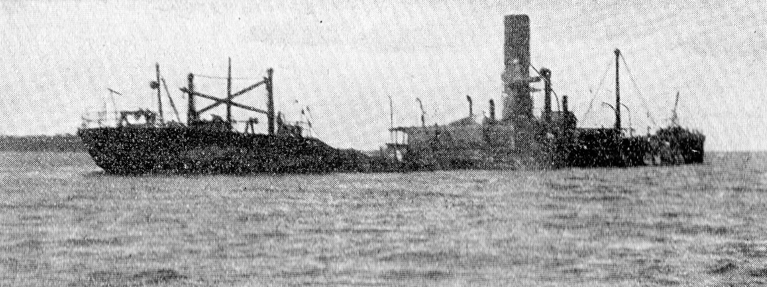 Deutscher Blockadebrecher RUBENS, Mansabucht, Deutsch-Ostafrika, 1915